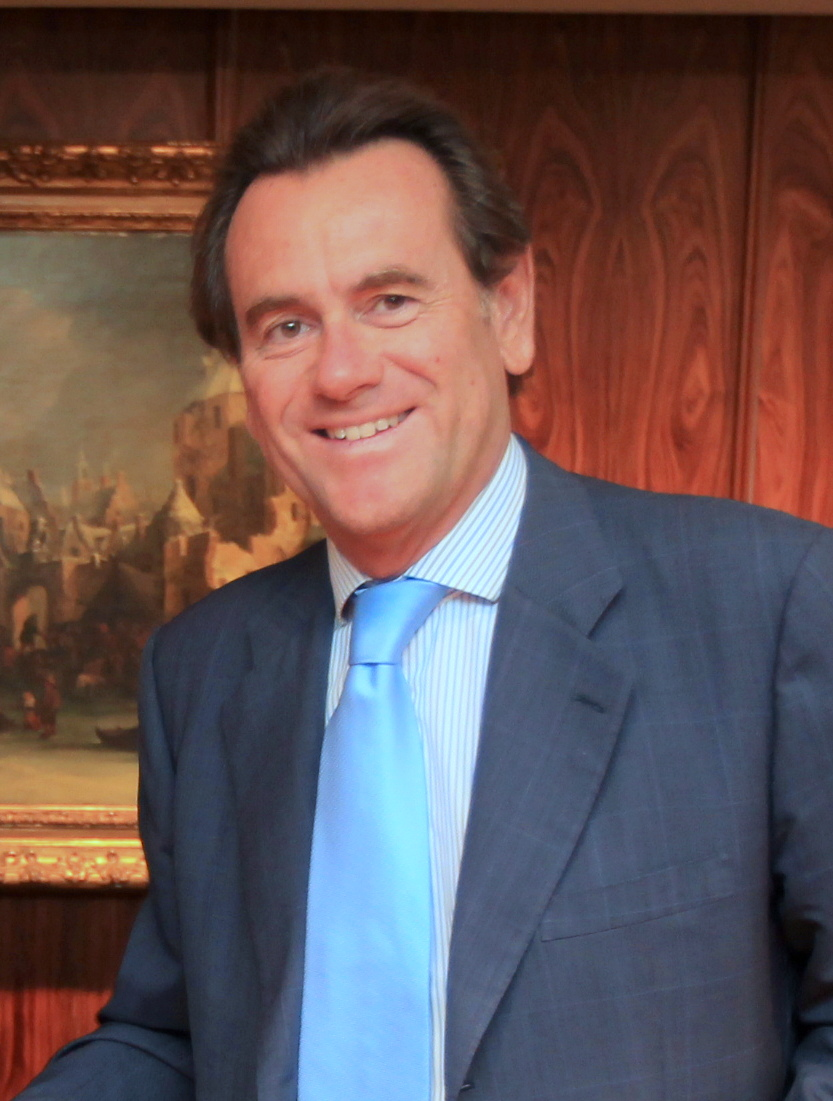 El empresario Sixte Cambra en 2011.